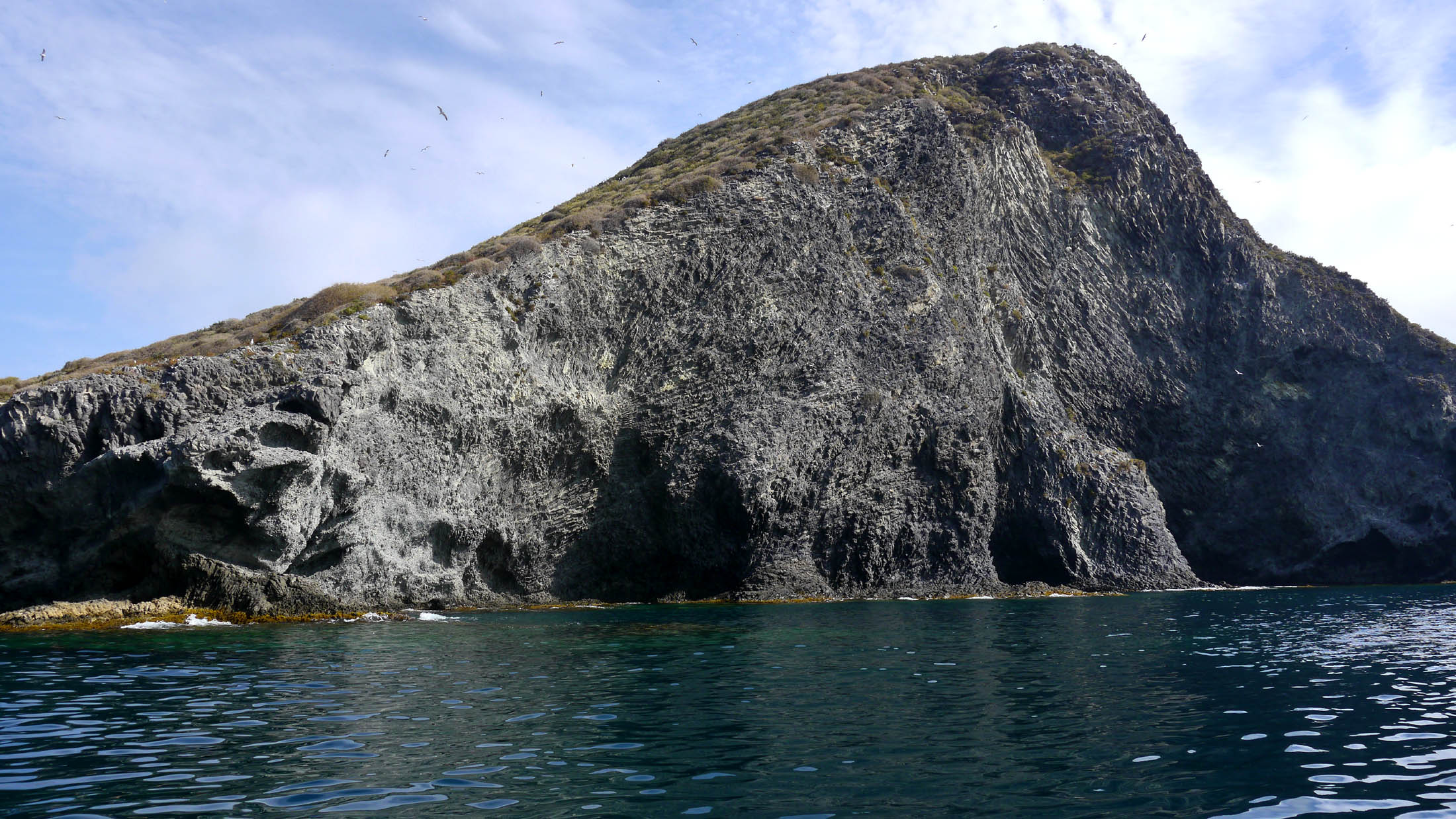 Disyunciones columnares en los acantilados de Isla Grosa (Región de Murcia, España).